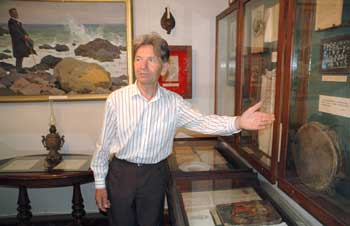 Сергій Левкович Хаврусь